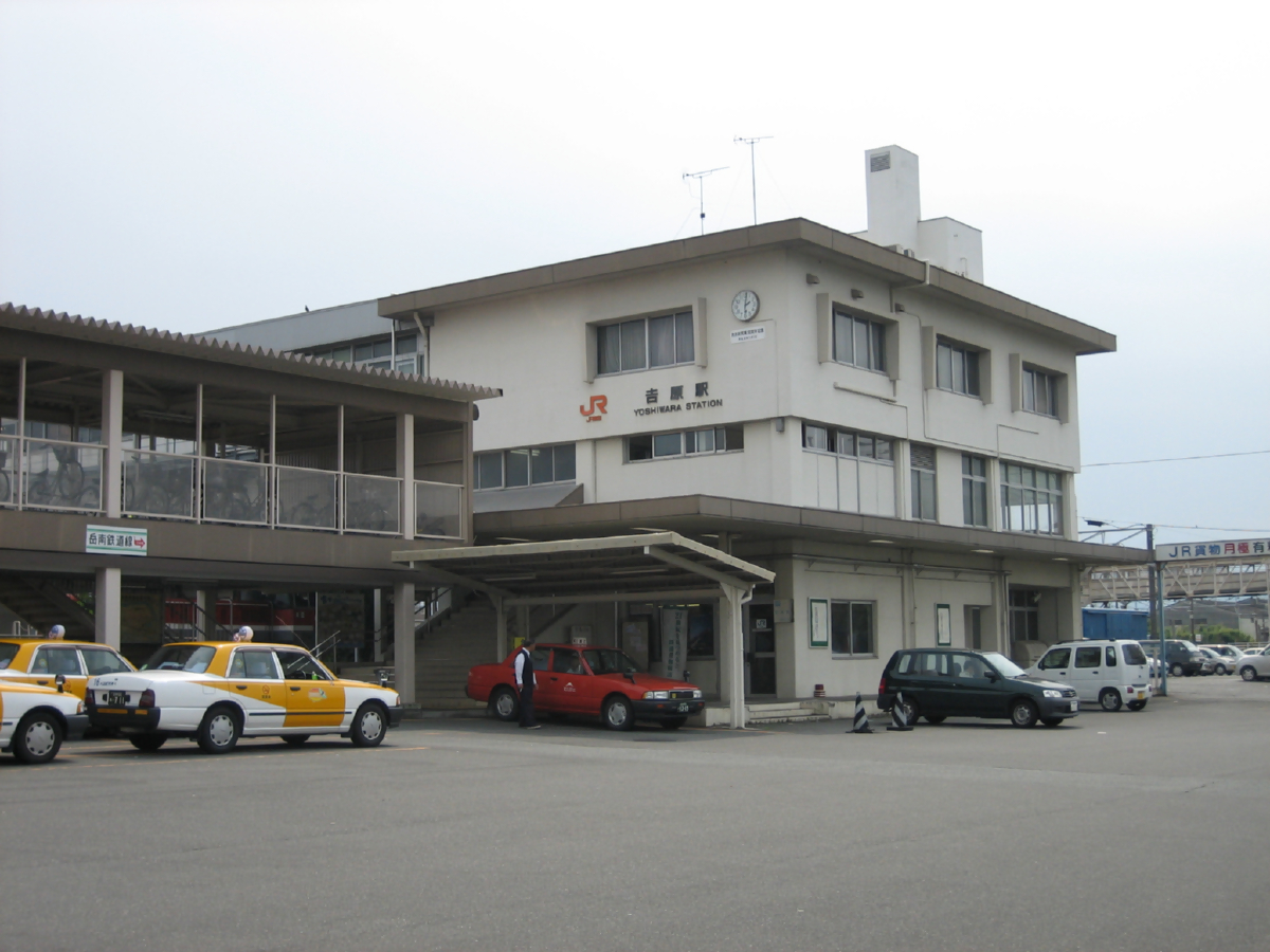 吉原駅北口